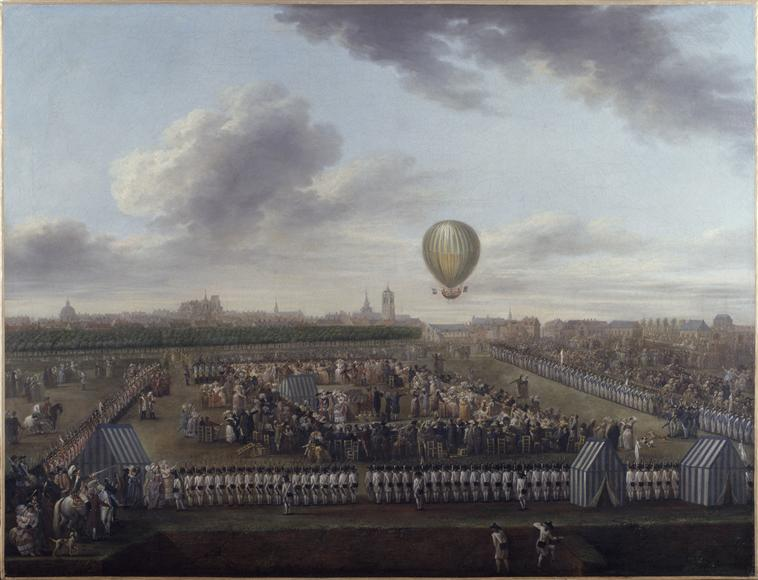 Le 26 août 1785 , M. Blanchard fit son quatorzième voyage aérien a Lille; il était accompagné du chevalier de Lépinard, amateur intrépide qui partagea ses dangers et son triomphe. Cinq jours après leur départ, ces deux aéronautes firent leur rentrée à Lille au bruit de l'artillerie et des fanfares. Deux tableaux de Louis Watteau et deux belles gravures d'Helman ont conservé ces faits qui eurent alors un retentissement considérable. Archives historiques et littéraires du nord de la France, et du midi de la Belgique, Volume 1, 1830, page 246.